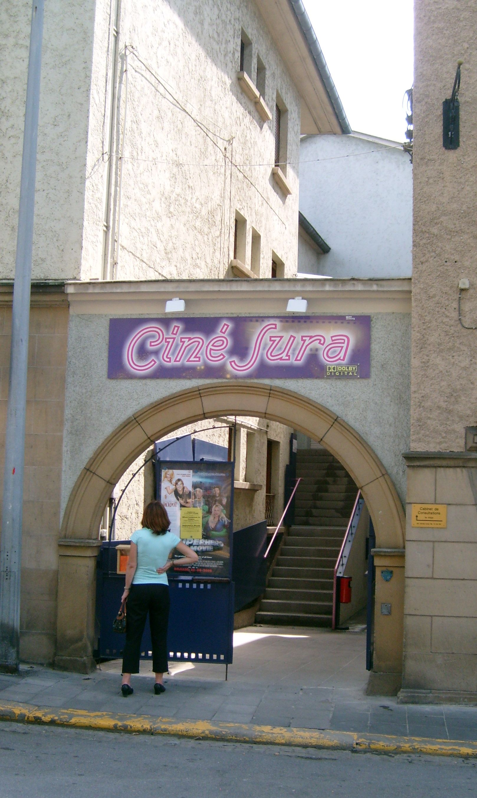 Sujet: Ciné Sura, Iechternach, 30.07.2008